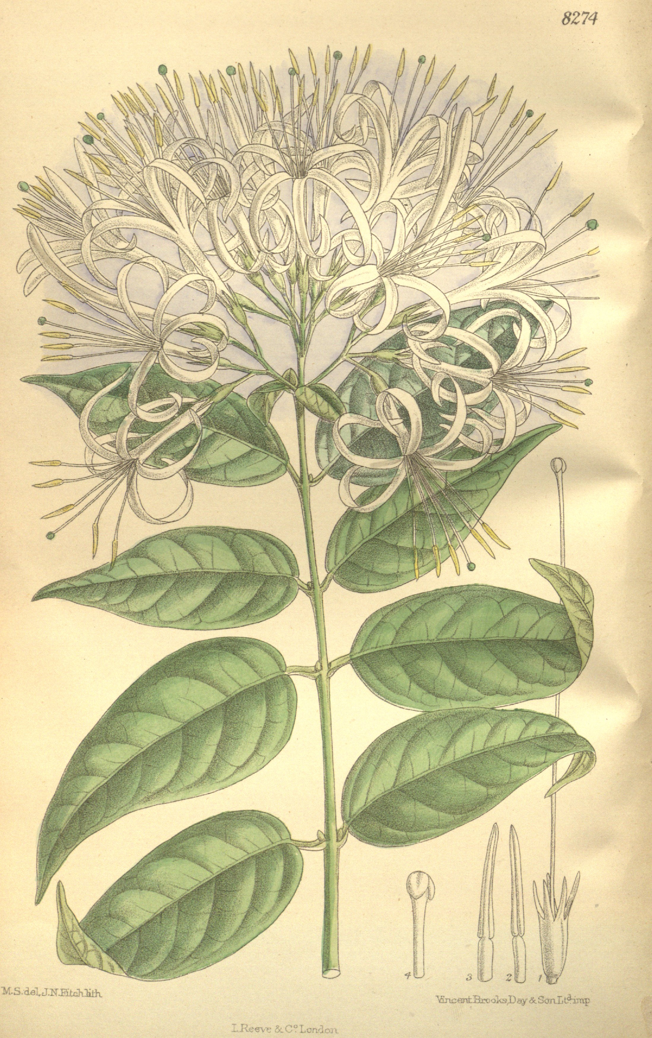 Exostema subcordatum, Rubiaceae